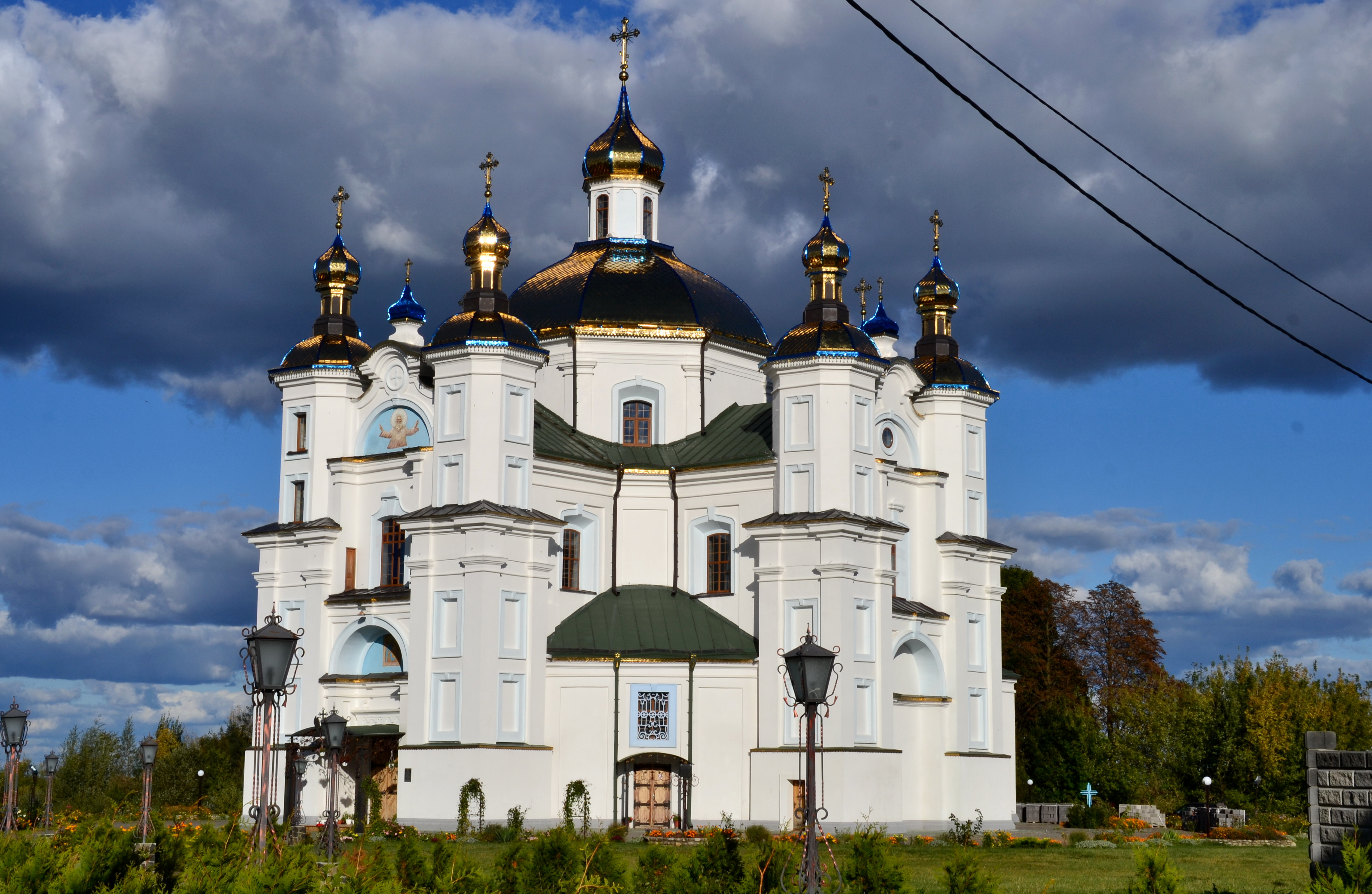 Покровська церква (мур.) (1745 рік) - вигляд з південного заходу - Піддубці Луцький район Волинська область Україна